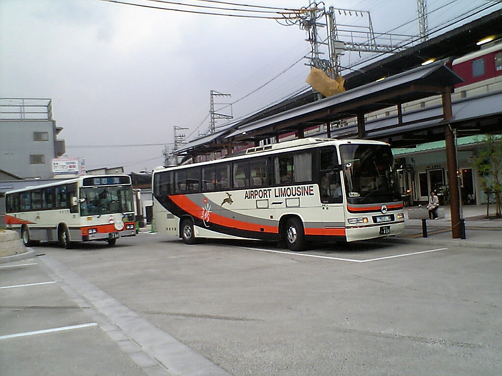 大和八木駅:南口バス降り場です。